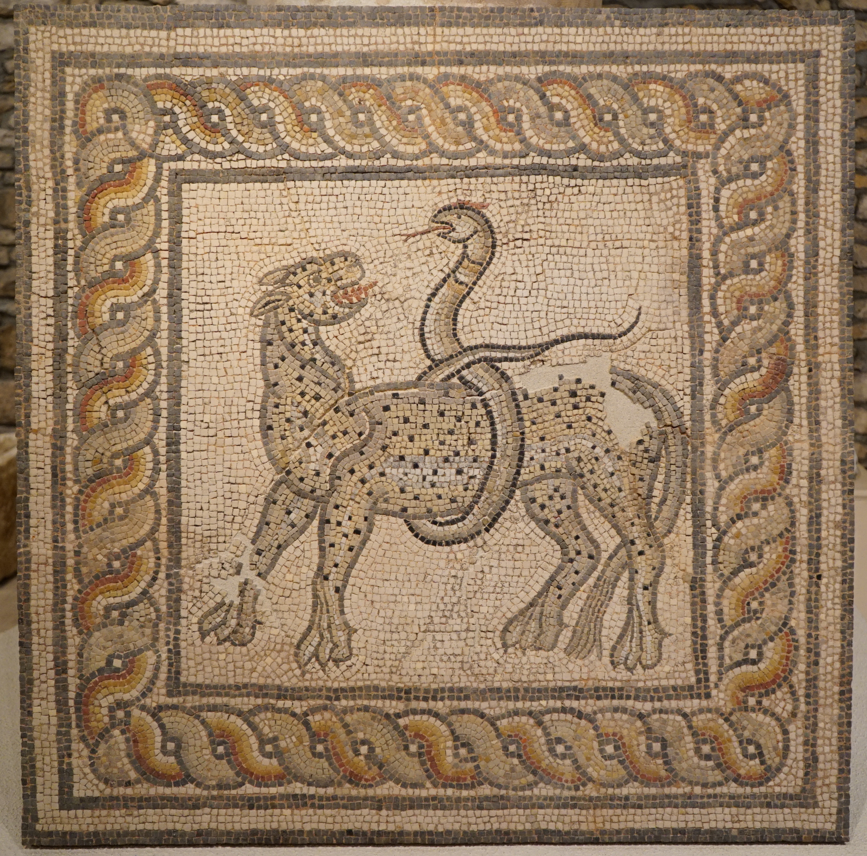 présenté au Musée d'art et d'histoire de Chaumont.